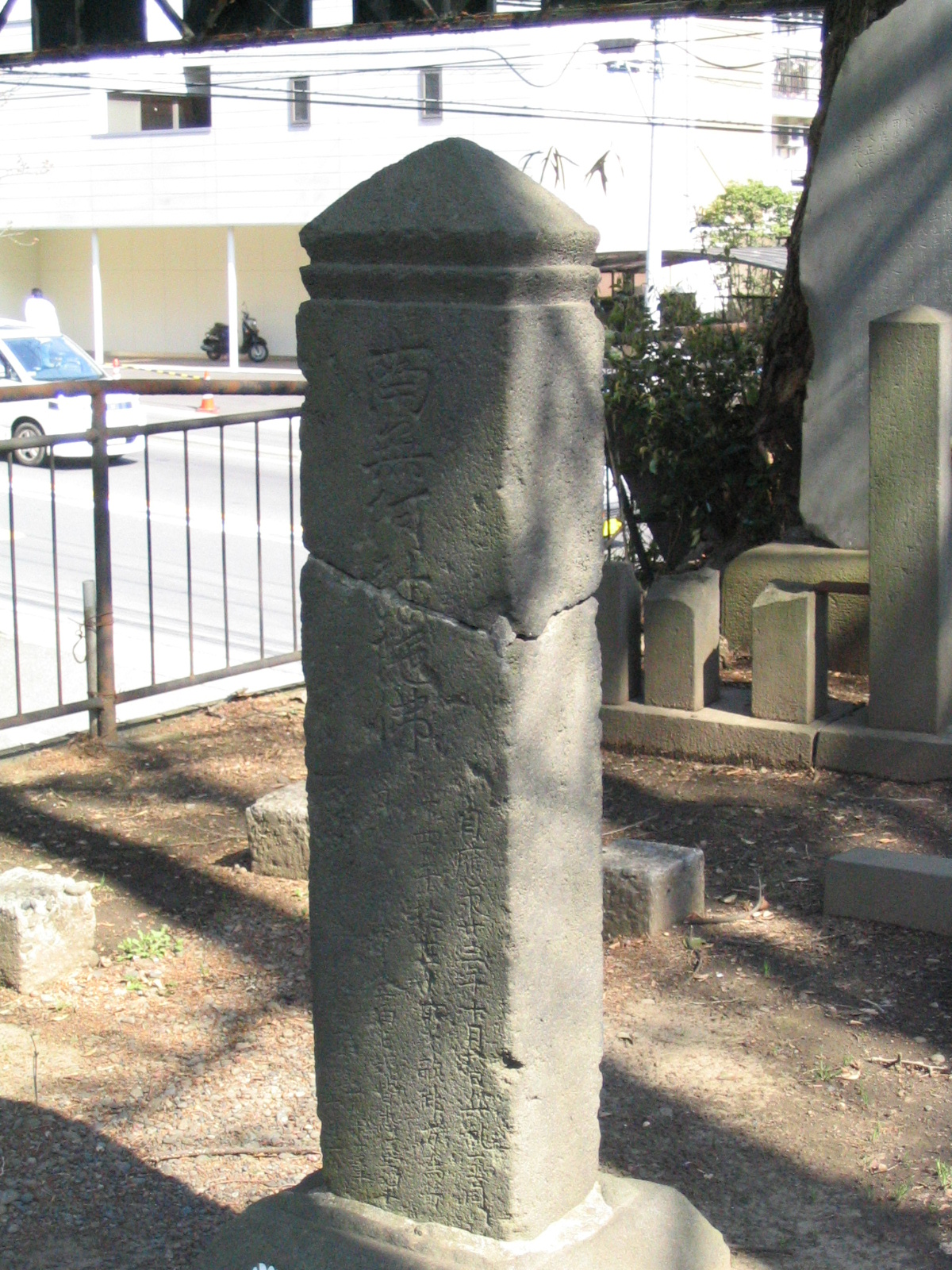 撮影者自身による投稿。2006年3月25日撮影。 敵御方供養塔。Tekimikata Kuyōtō, Fujisawa, Kanagawa, Japan